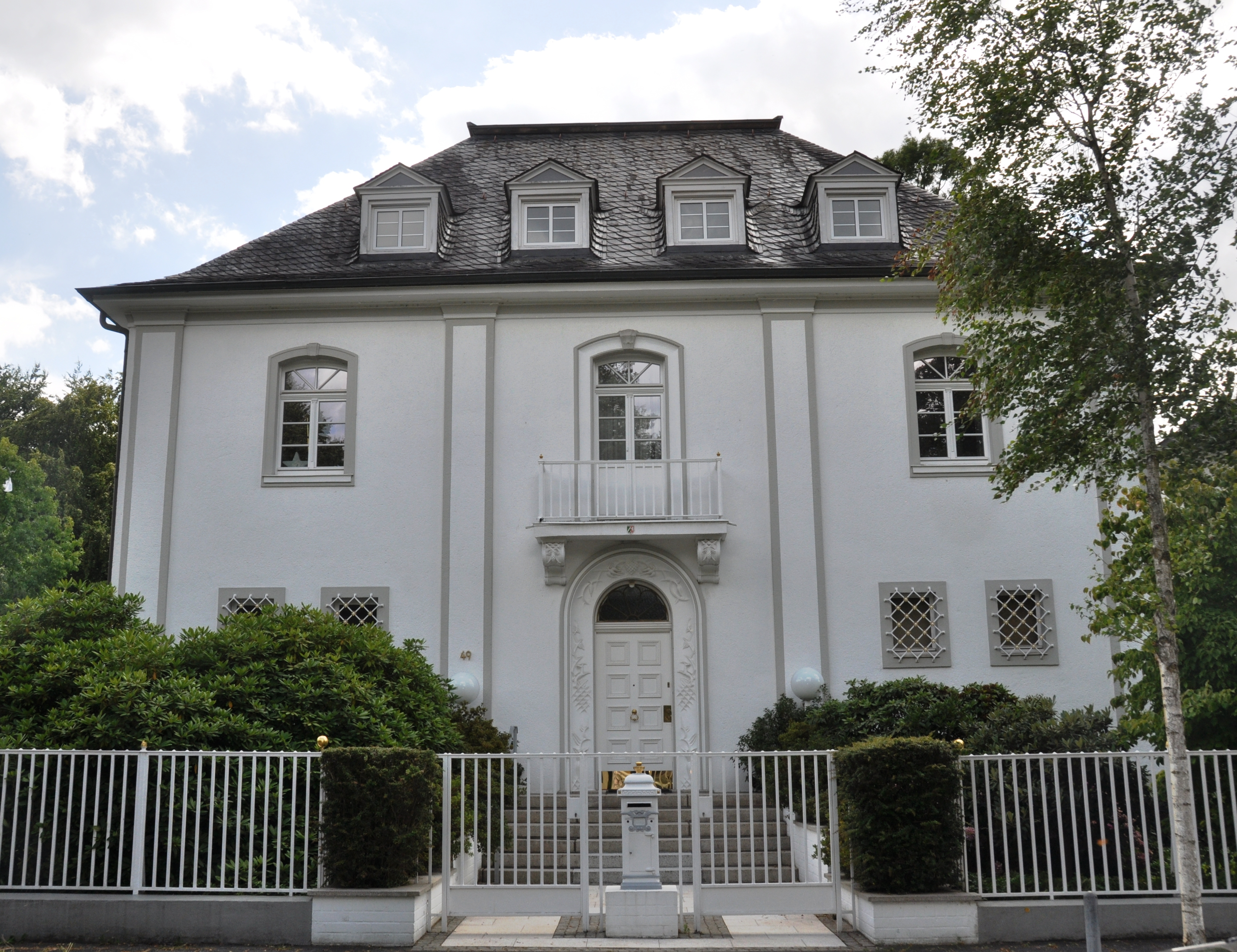 Architekt: Georg Falck; Teil einer Villengruppe 1922–1924 This is a photograph of an architectural monument.